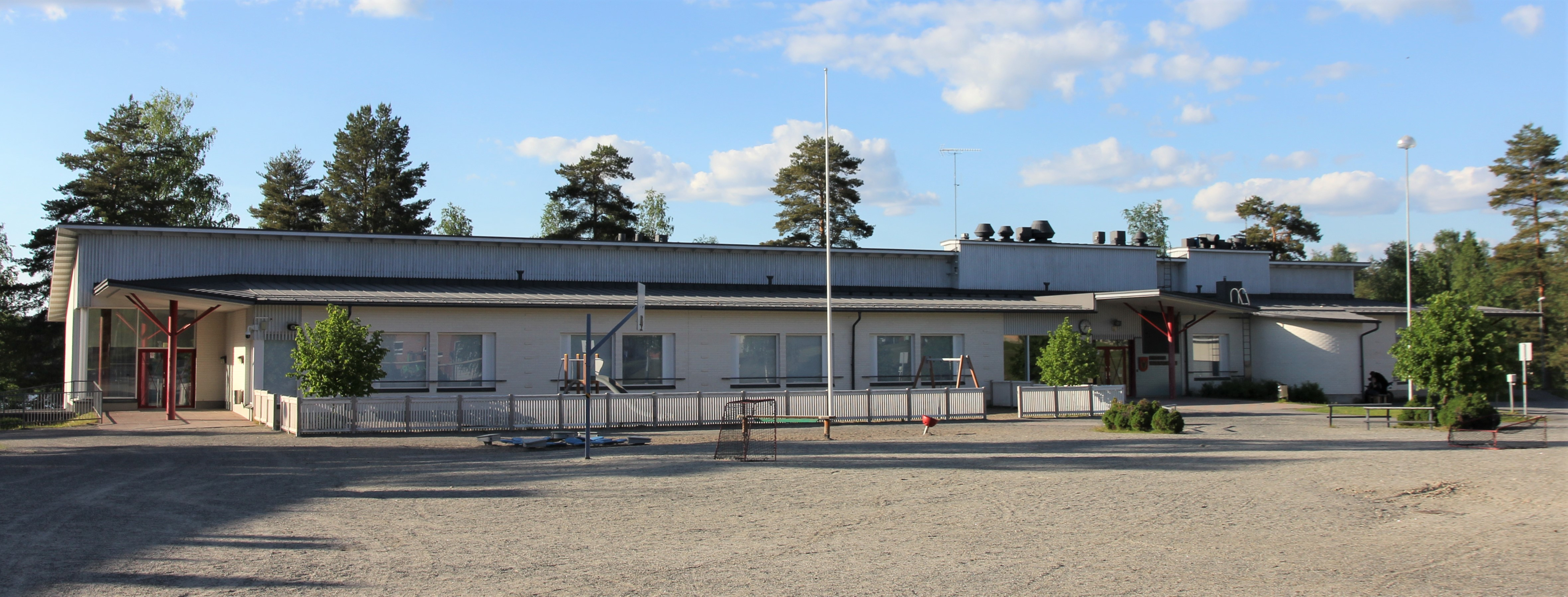 Pertunmaan yhtenäiskoulu on peruskoulu Pertunmaalla Etelä-Savossa. Rakennuksen päädyssä (kuvassa oikealla) toimii.